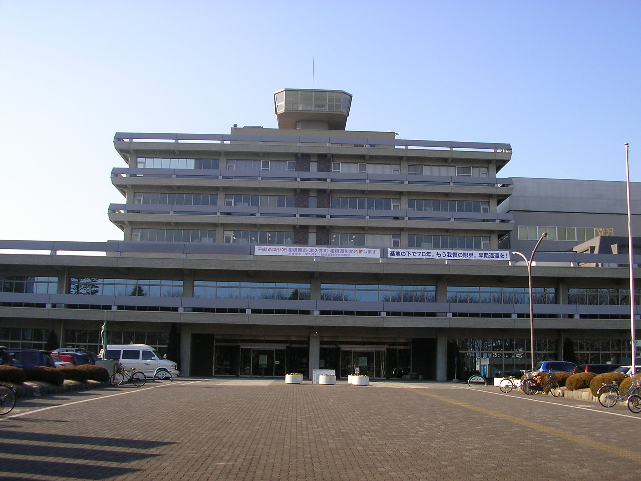 Sagamihara City Hall Kanagawa